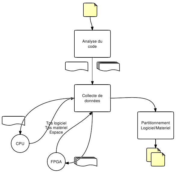 Représentation d'une approche automatique/semi-automatique